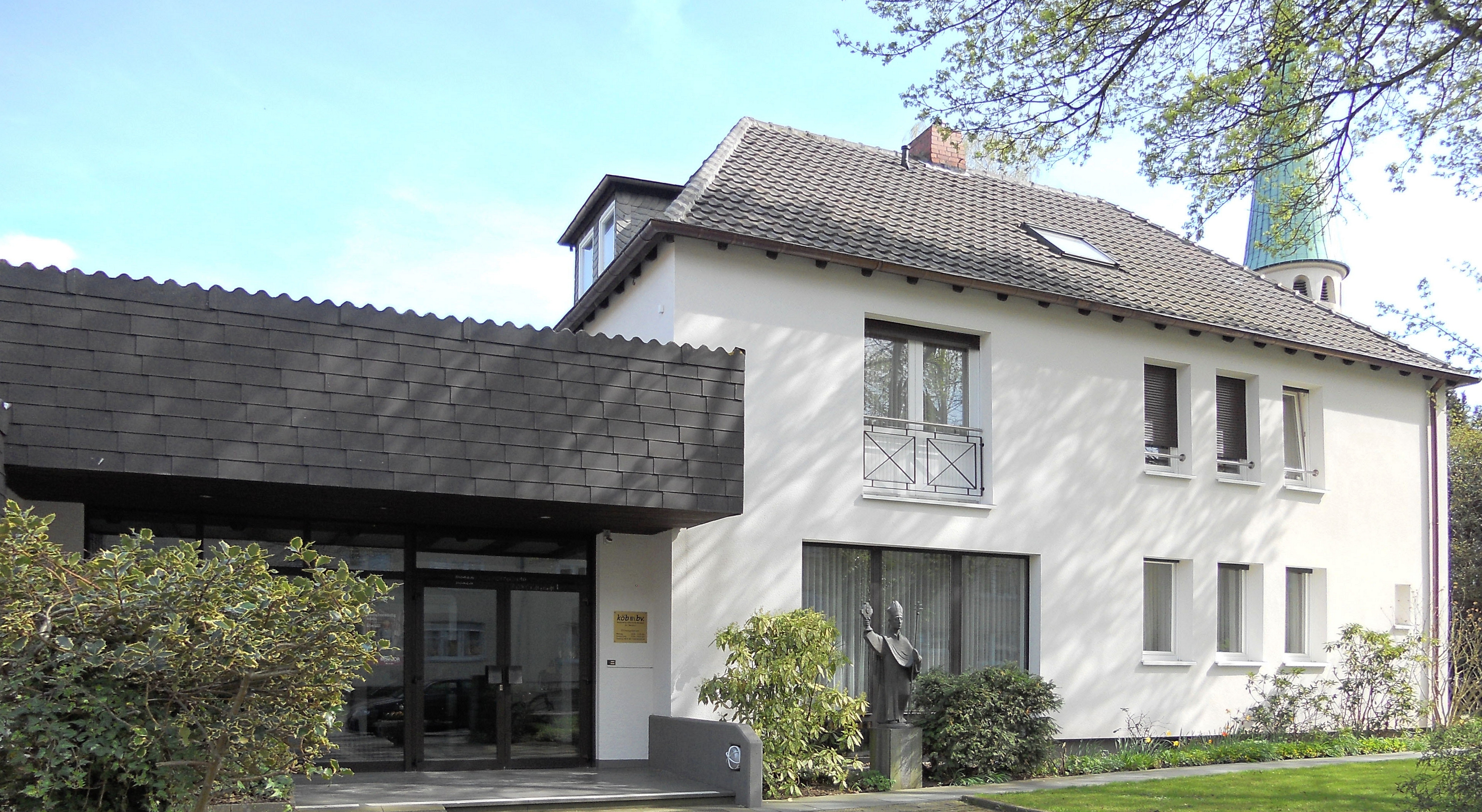 Werl, Sankt Norbertkirche, Gemeindezentrum, Außenansicht 1